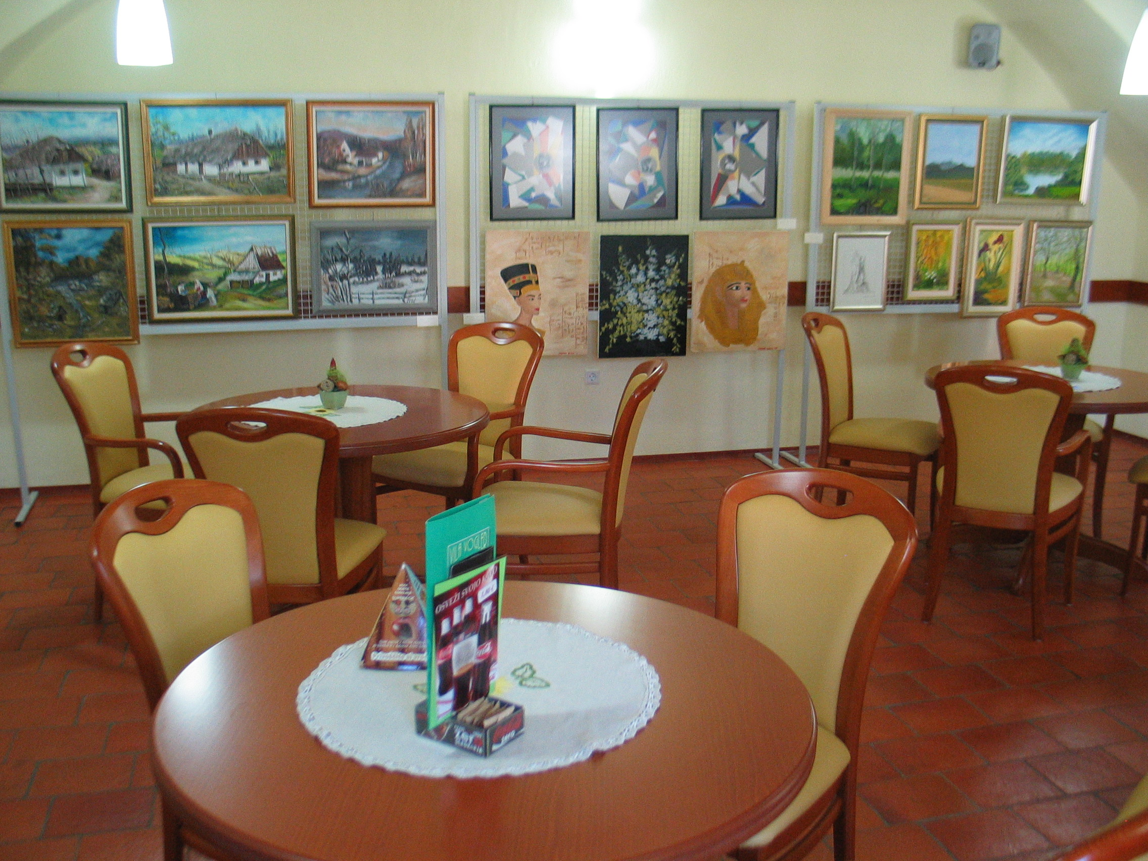 Razstava likovnih del v Kavarni Vogler